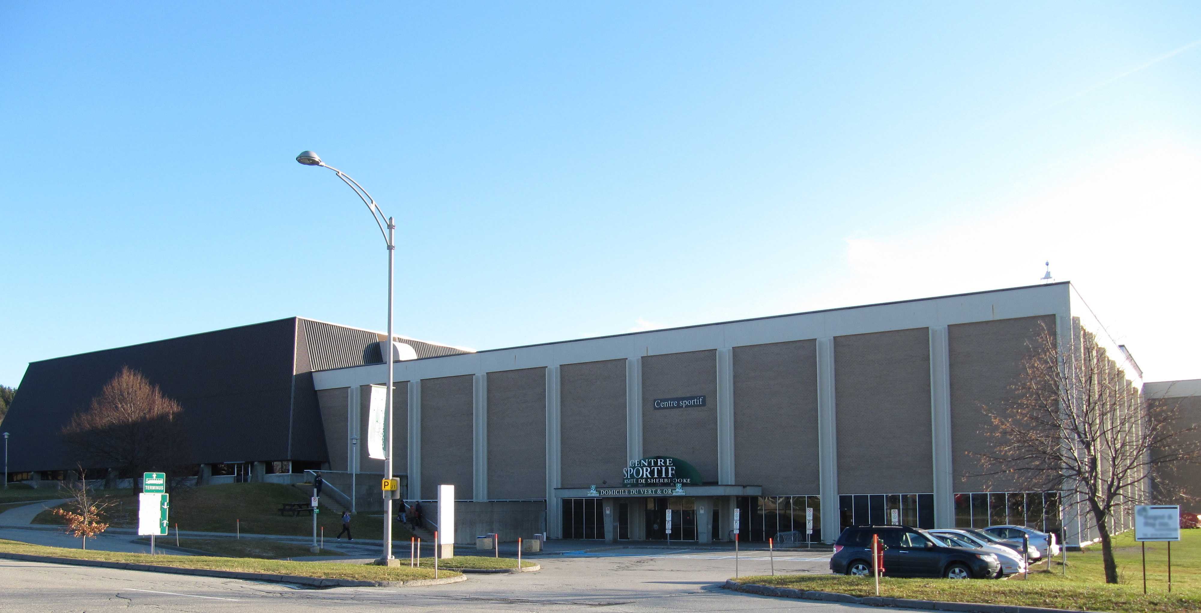 Centre sportif (pavillon Universtrie) de l'Université de Sherbrooke